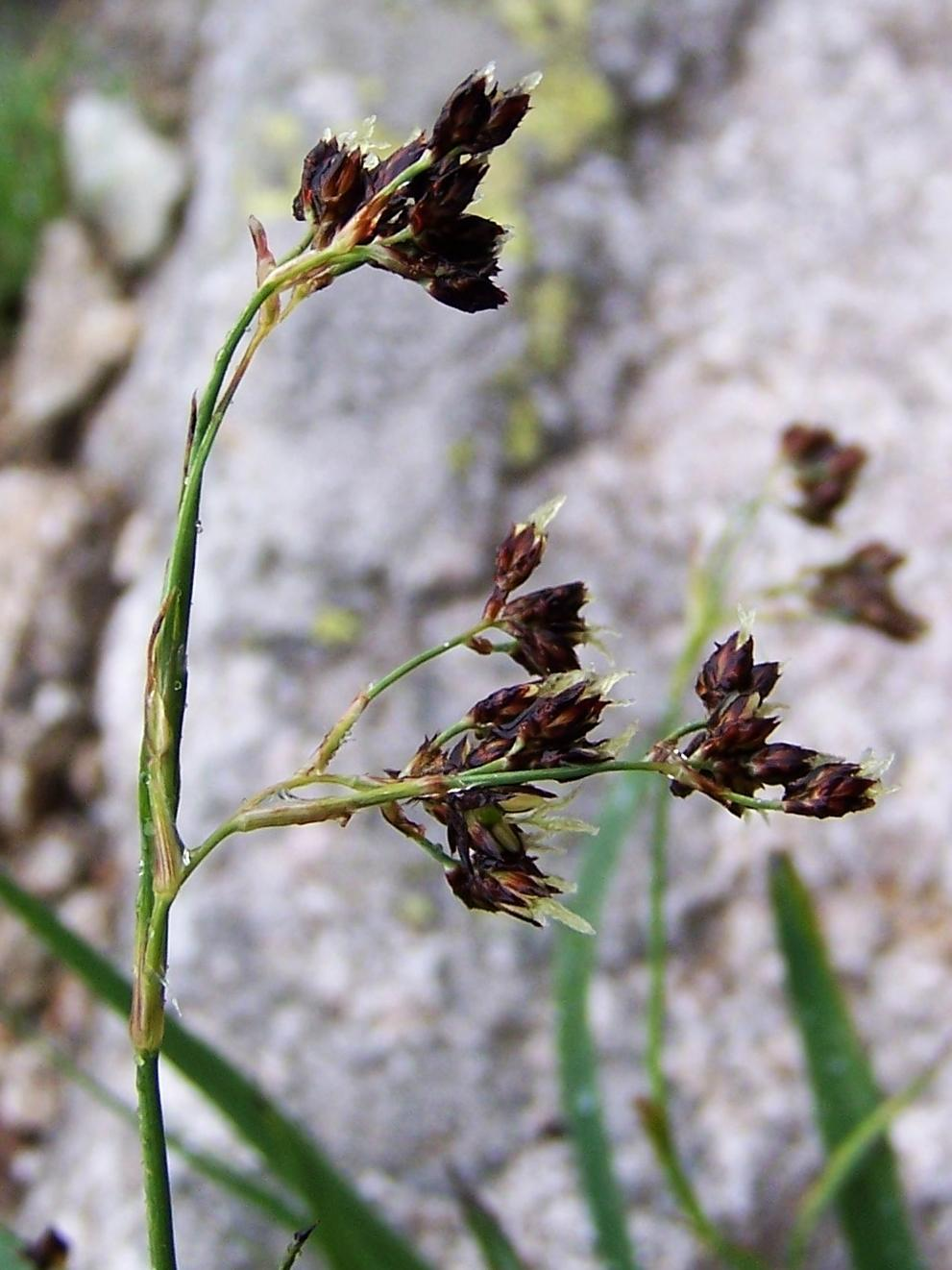 Luzula spadicea =Luzula alpino-pilosa (pl. kosmatka brunatna), habitat: Tatra Mountains, Orla Perć)